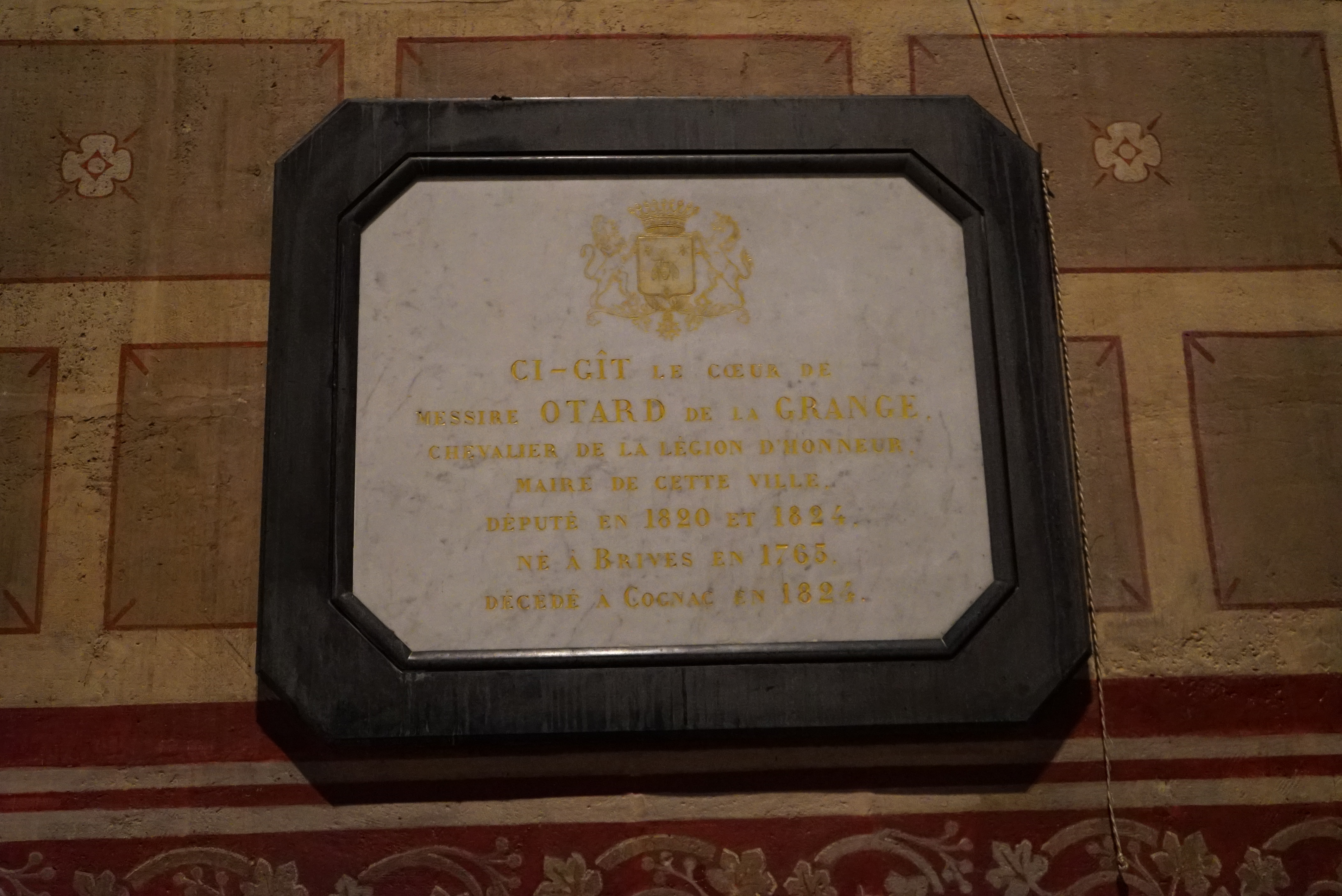 en la Chapelle à la Vierge de l'Église Saint-Léger